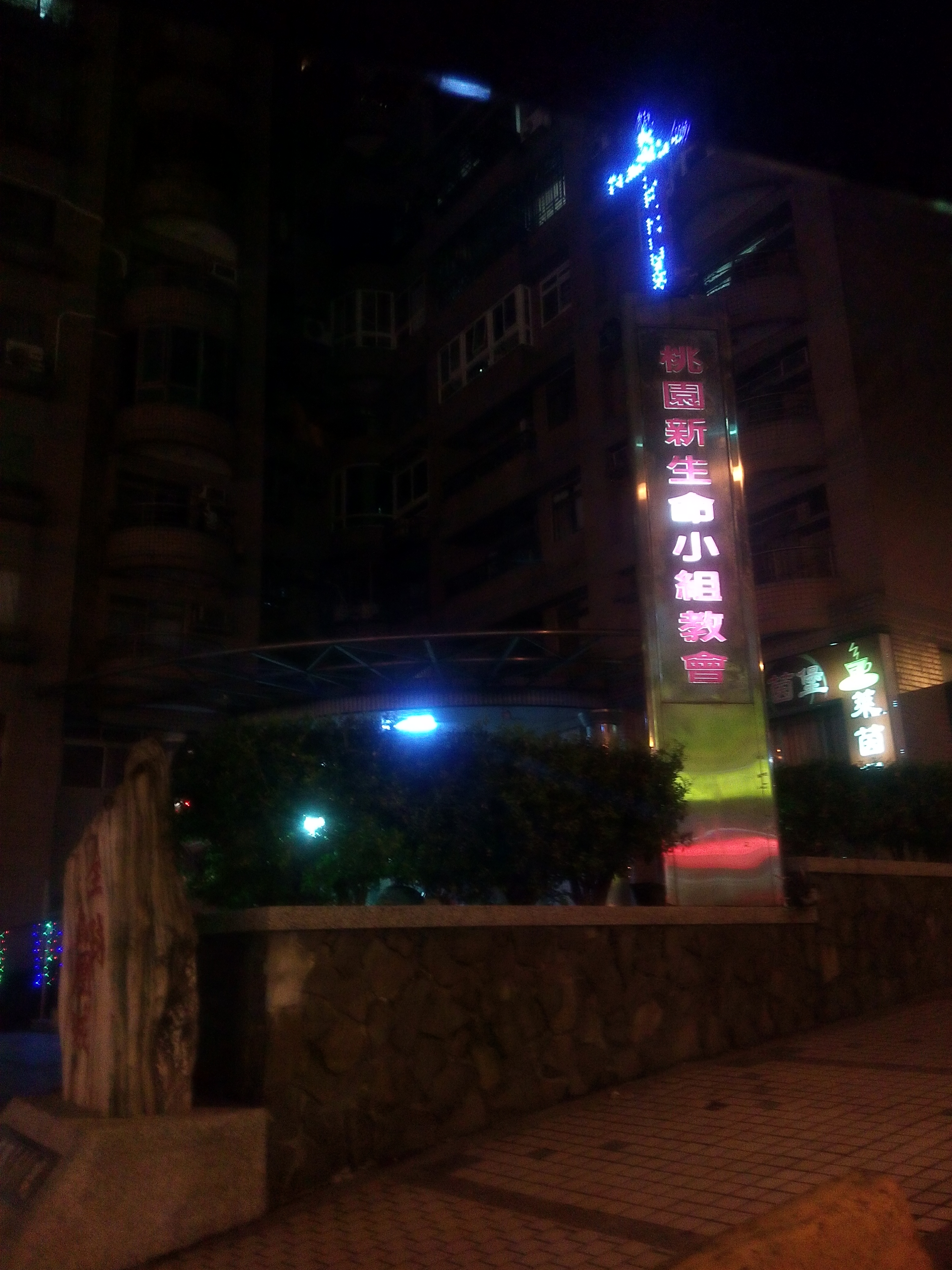 中文（台灣）: 桃園新生命小組教會，位於桃園市桃園區大有路660號B3。